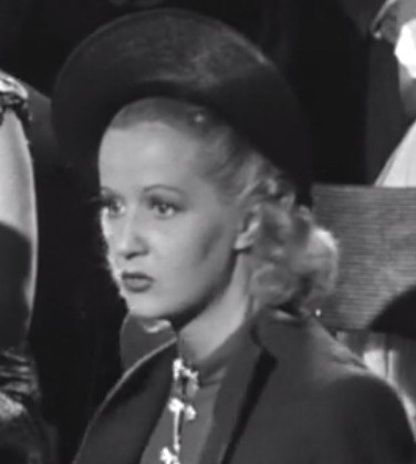 Screenshot dal film Imputato, alzatevi! (1939)